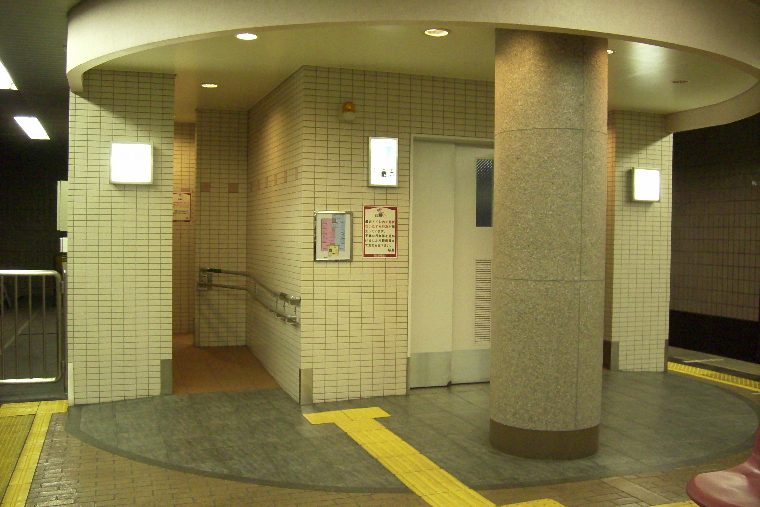 阪急電鉄河原町駅のトイレ。